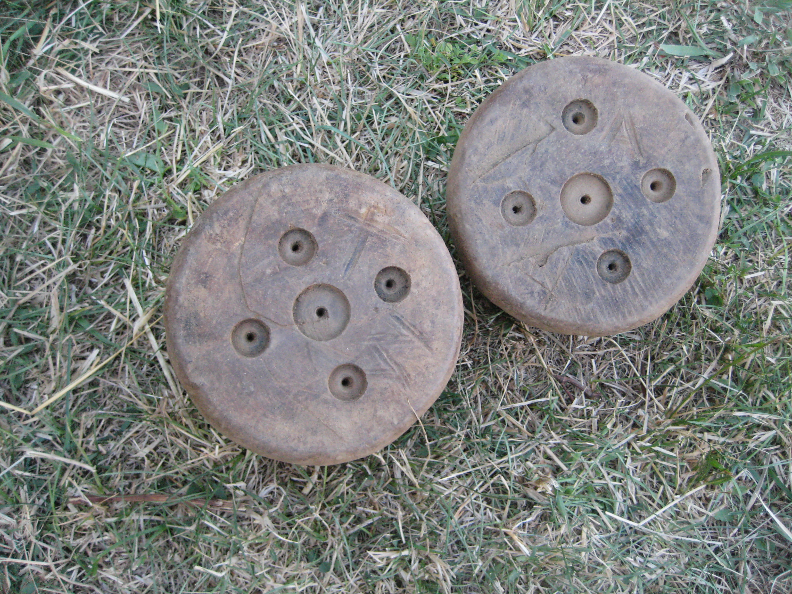 BolasBolosJulio2013